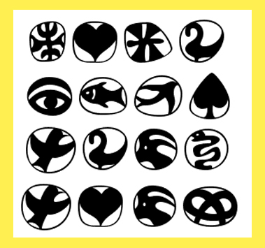 Exemple de Frutiger Symbols